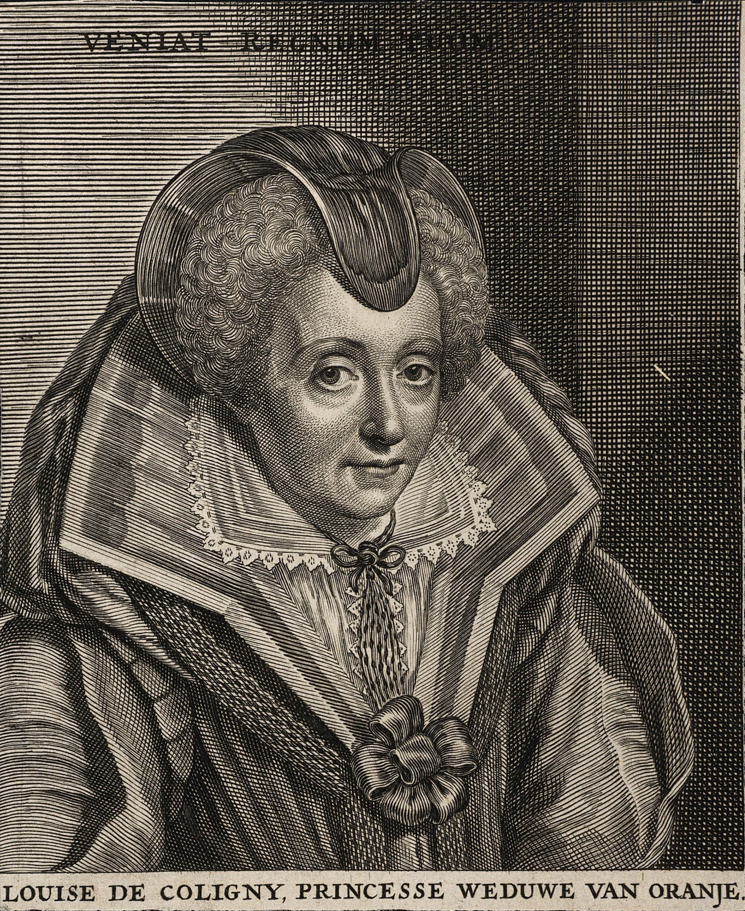 Portret van Louise de Coligny (1555-1620), echtgenote van Willem I (1533-1584), prins van Oranje